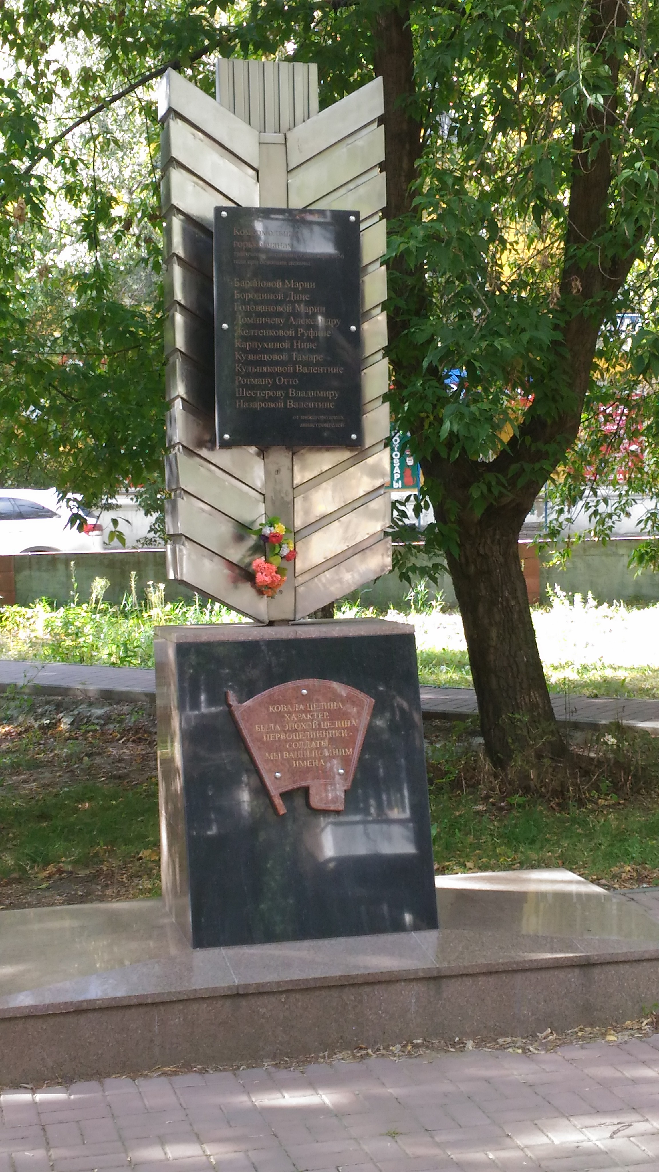 Нижний Новгород. Мемориальный знак памяти погибших на целине комсомольцев Горьковского авиационного завода